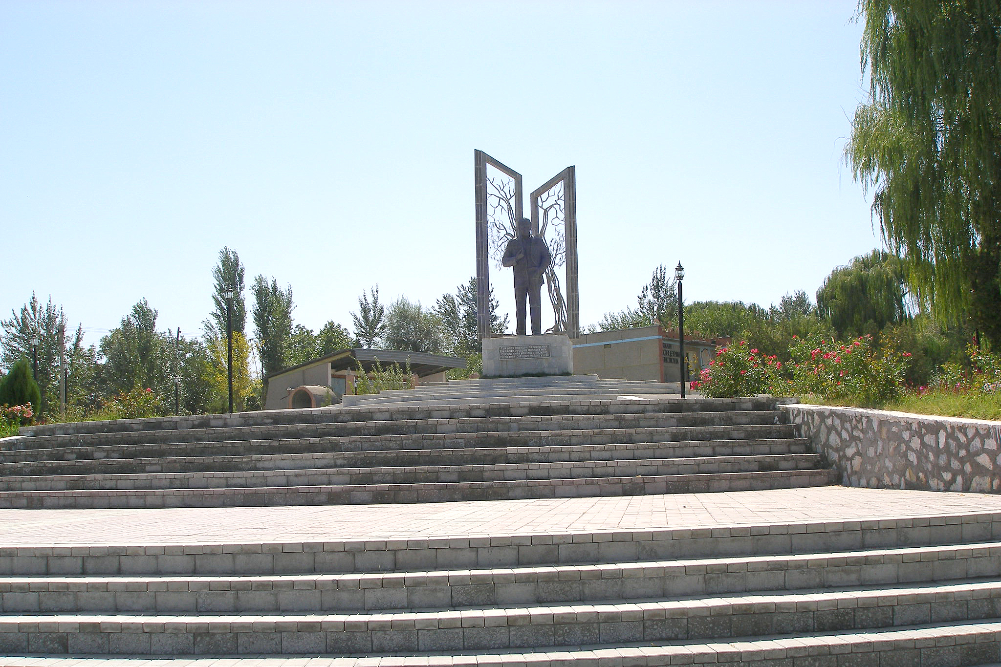 Тоҷикӣ: Гурӯҳ:Панҷакент